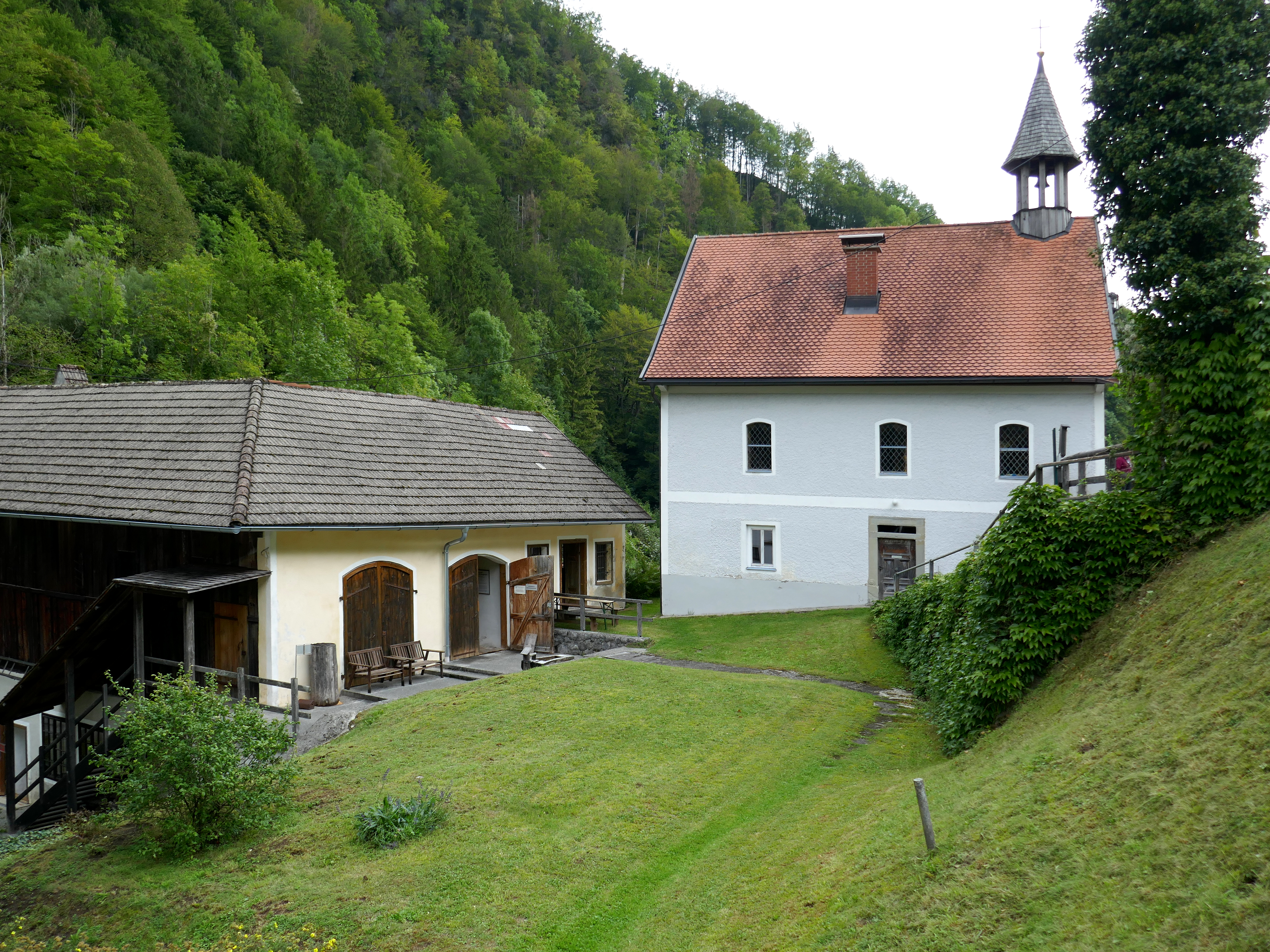 Im Tal der Feitelmacher, Trattenbach - Museum in der Wegscheid.